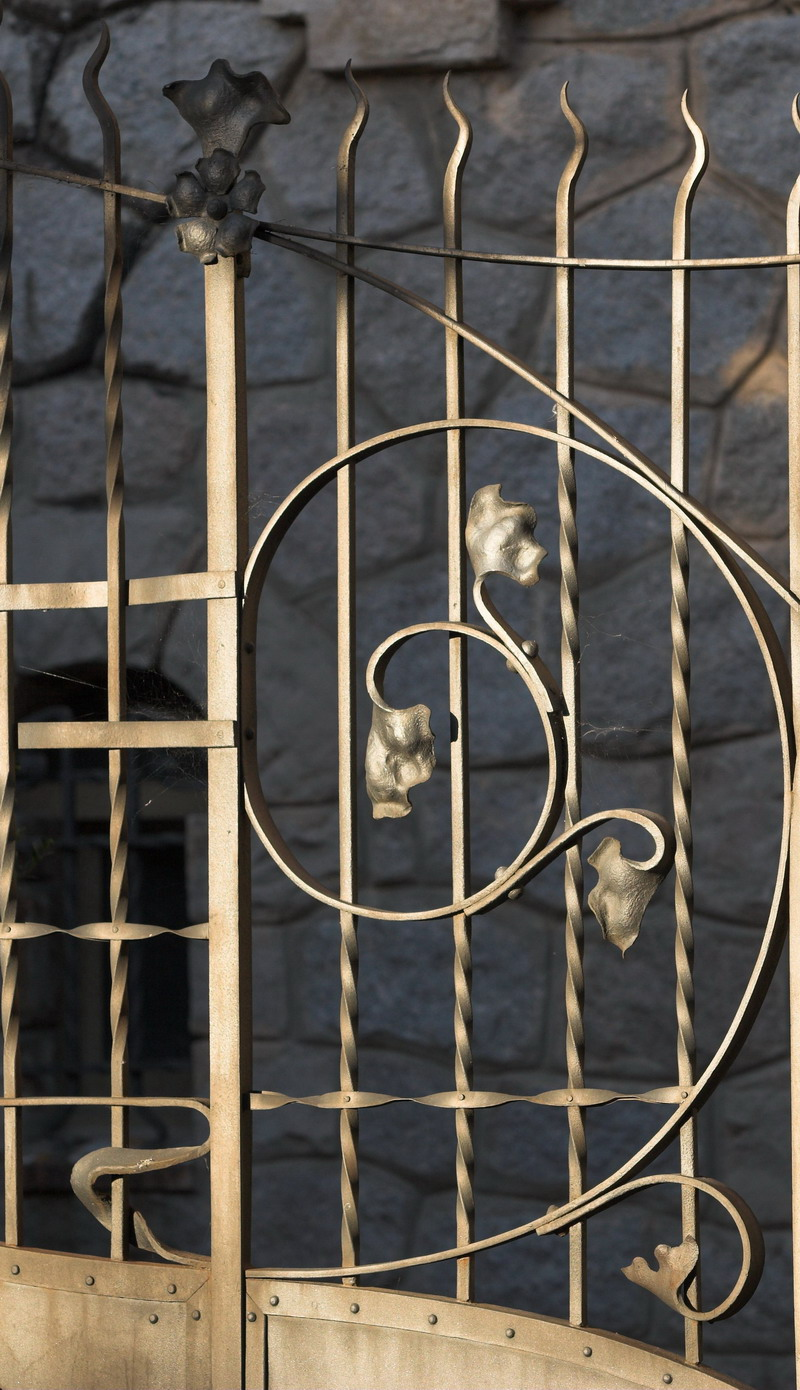 Forja modernista en "cop de fuet" (la Garriga-Vallès Oriental-Catalunya), obra de Joaquim Raspall 1910